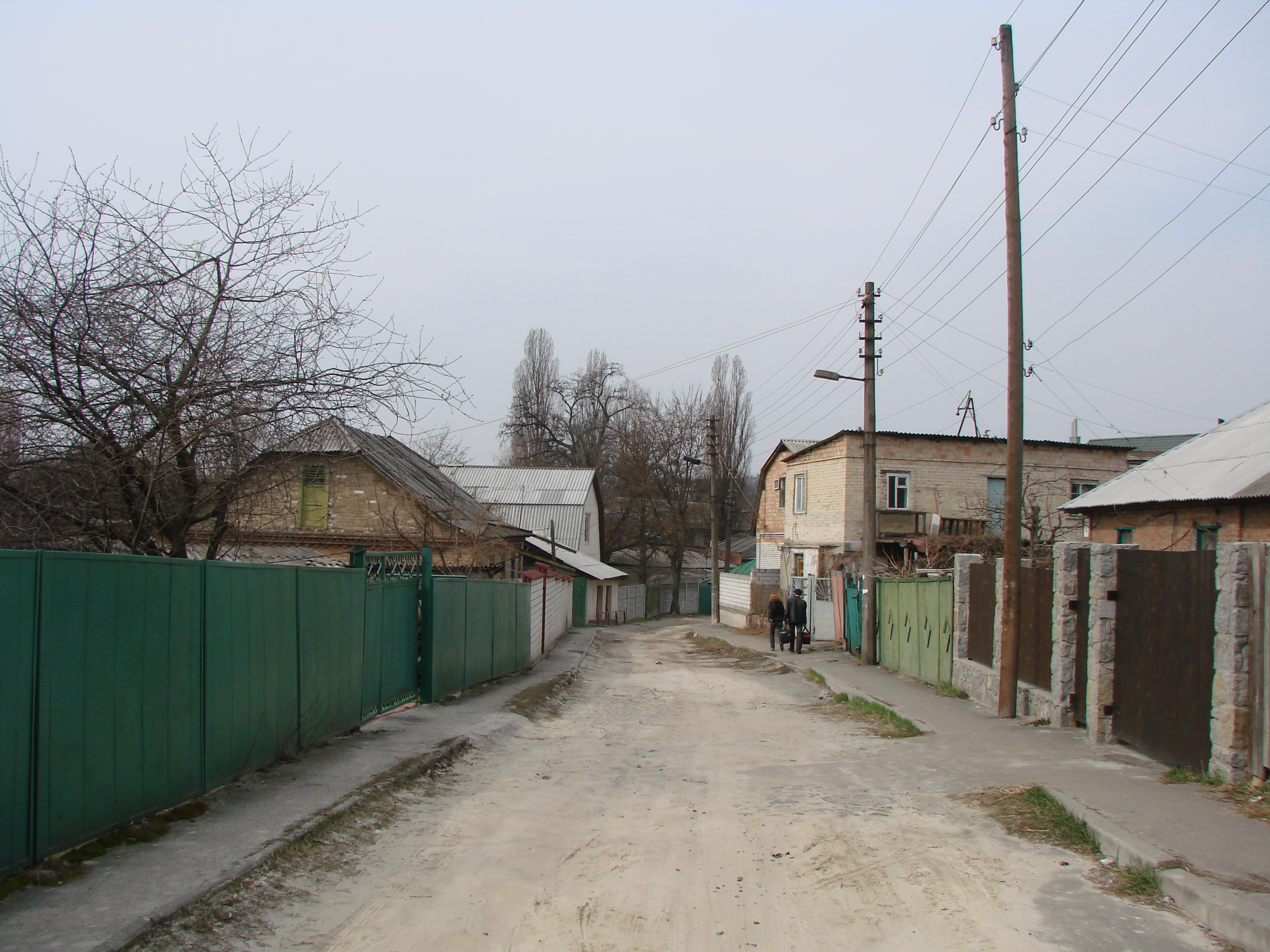 Фрометівський_уз-з_1.JPG: Загальний вигляд Фрометівського узвозу